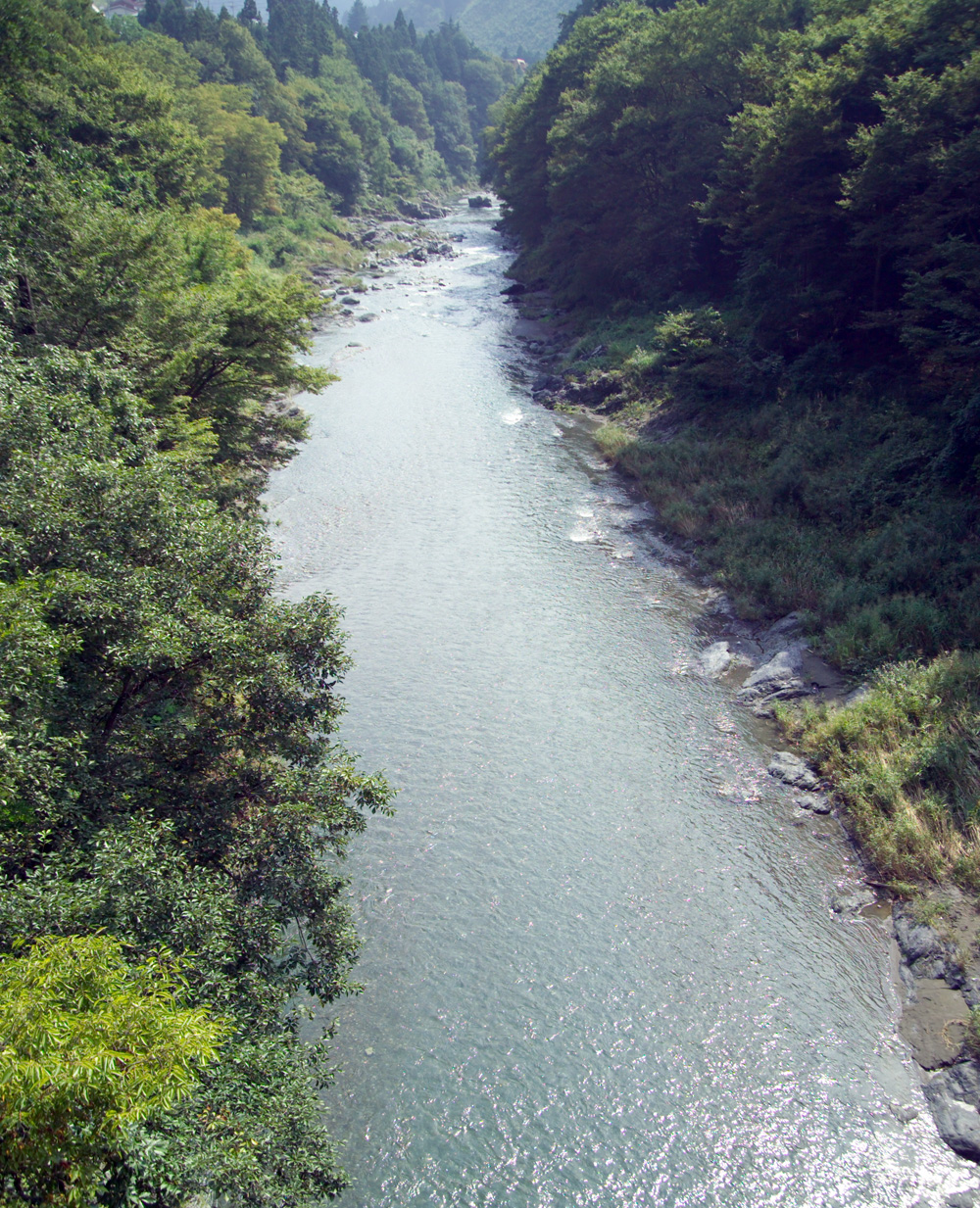 Tama River near Kori Station in Okutama, Tokyo.